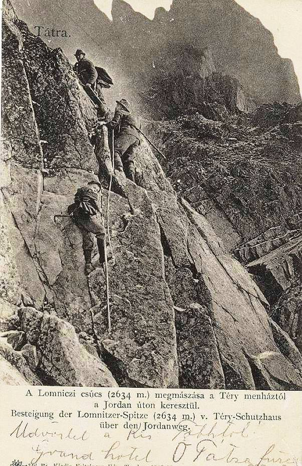 Výstup s horským vodcom Jordánovou cestou na Lomnický štít vo V. Tatrách